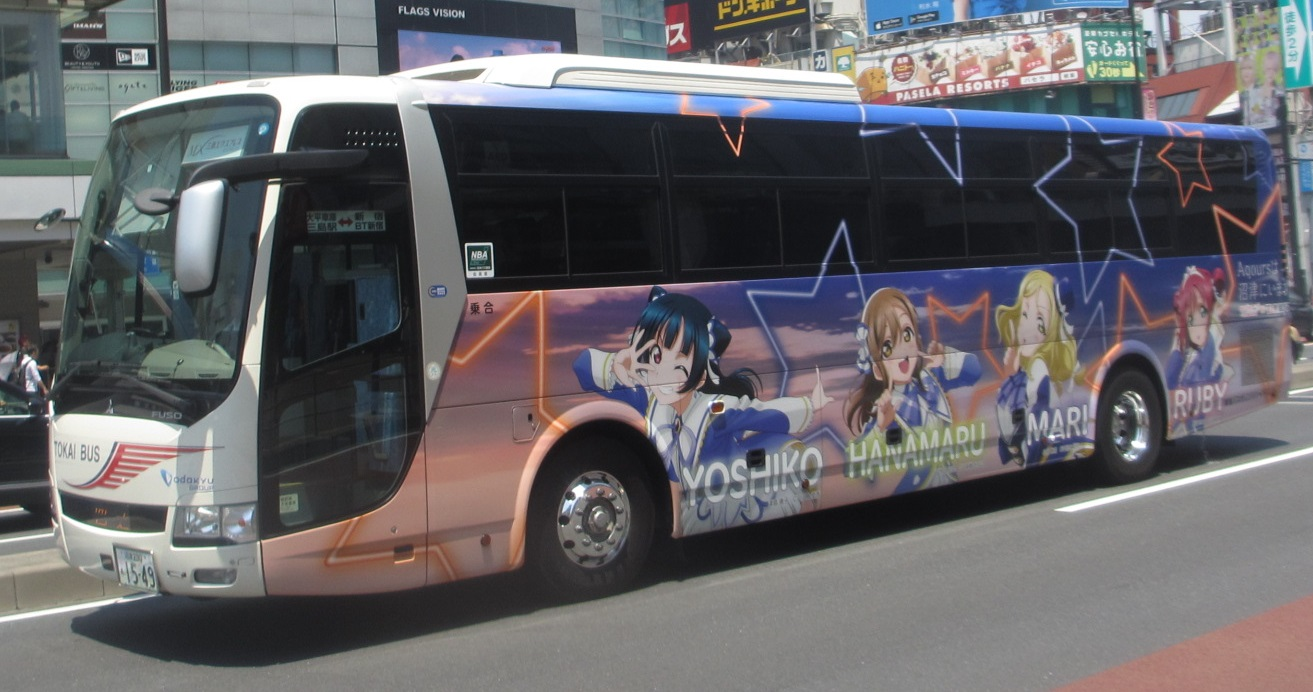 沼津230 あ 1549 東海バスオレンジシャトル大平車庫所属 三菱ふそう エアロエース（小田急電鉄グループ統一塗装） ラブライブ仕様4号車